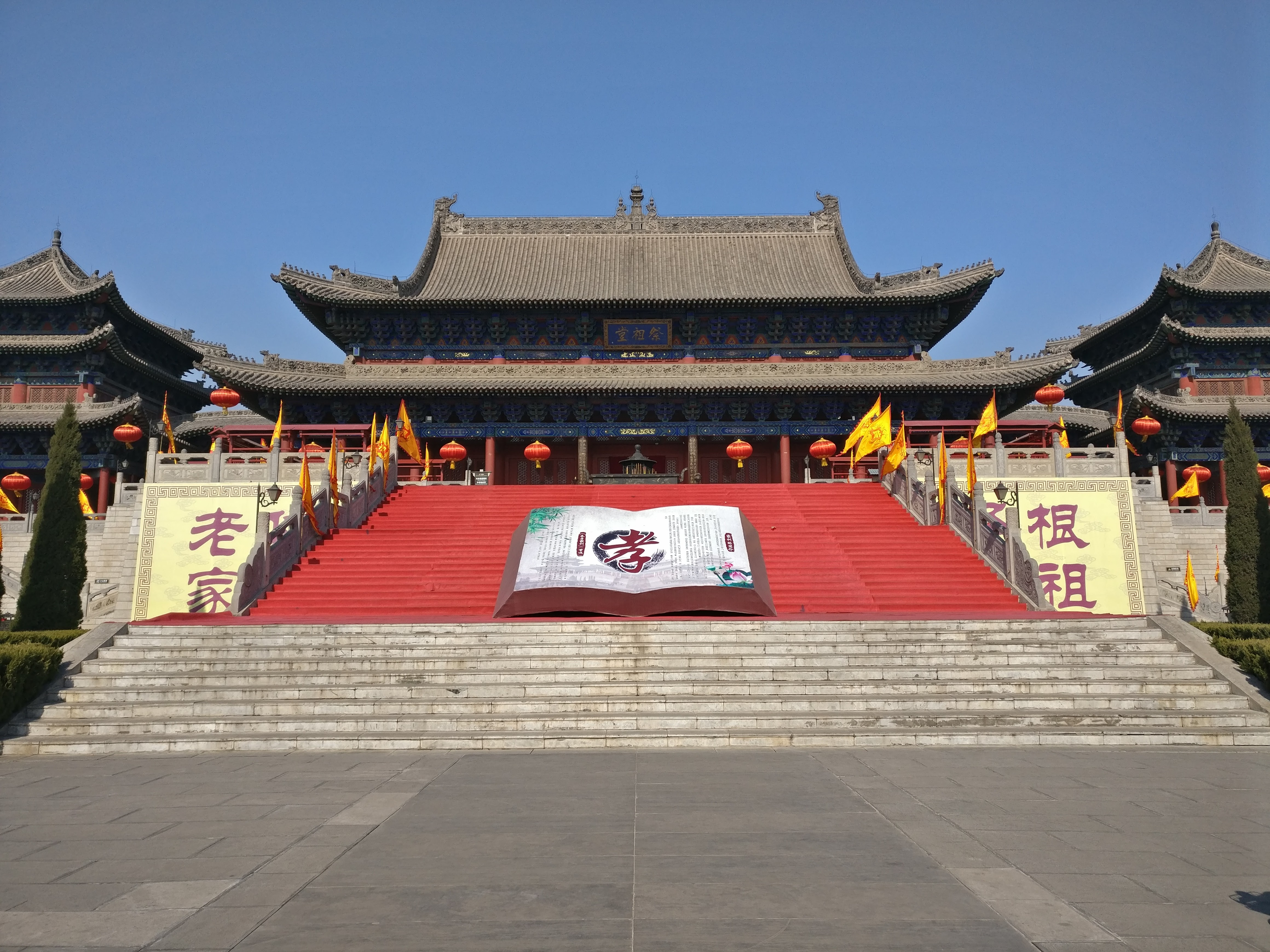 中文（中国大陆）: 洪洞大槐树根组纪念园